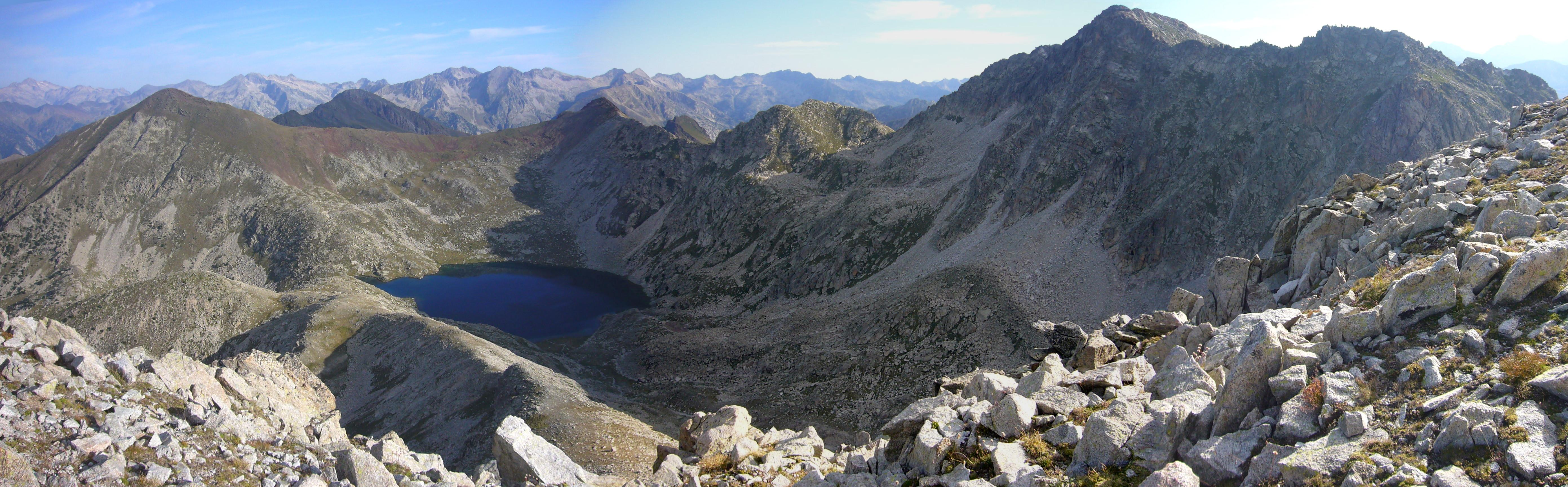 Coma del Pessó vista des de lo Pessó Petit; la Vall de Boí, Alta Ribagorça, Catalunya